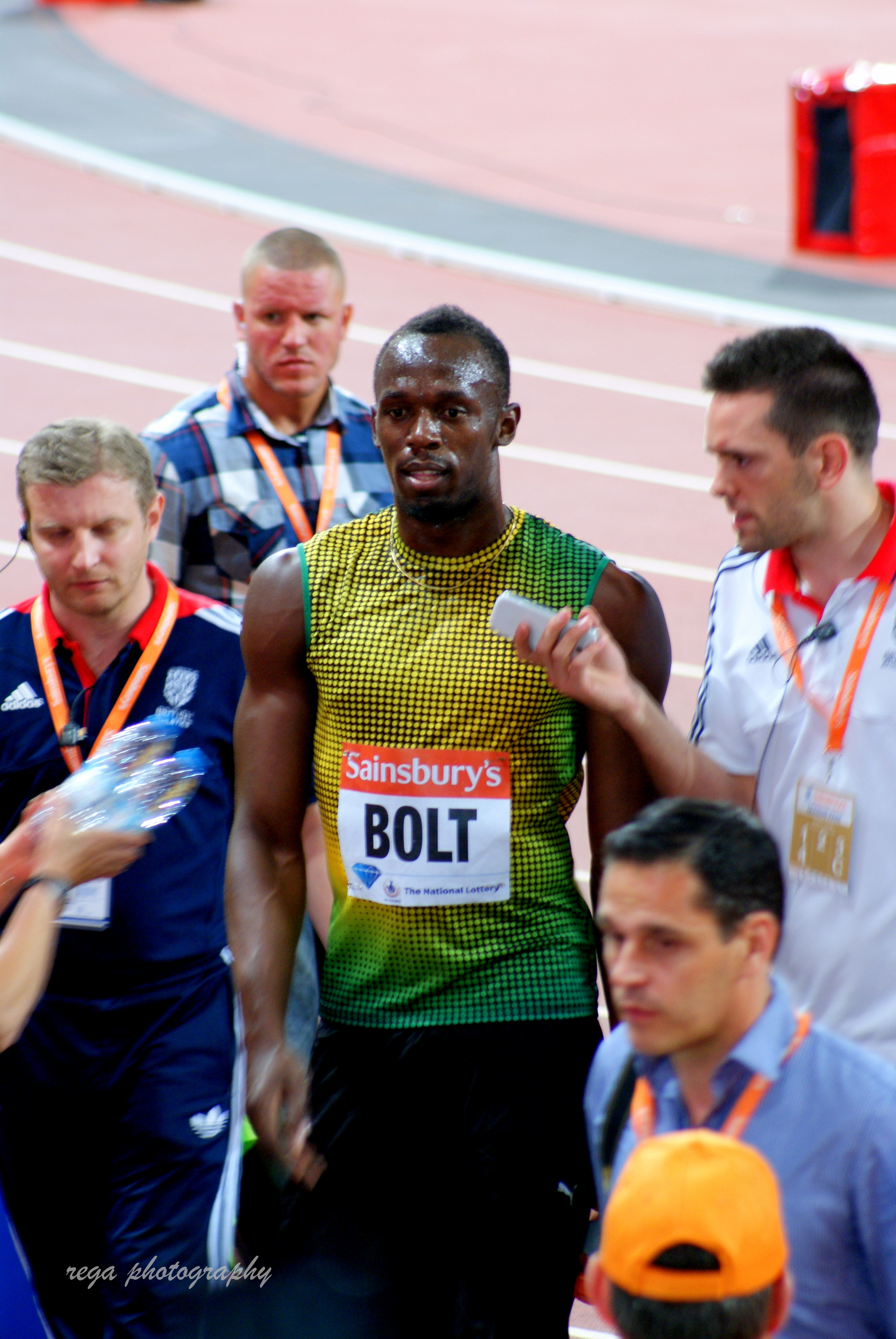 Usain Bolt - interview